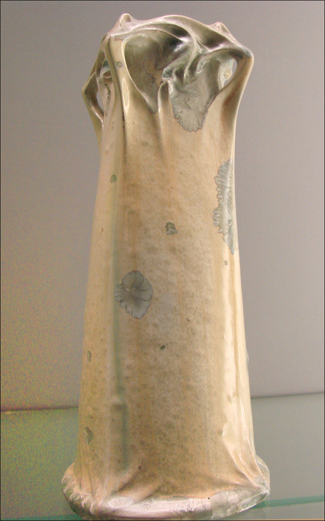 Vase "Cerny" vers 1904 conception par Hector Guimard (1867-1942) Manufacture nationale de Sèvres Grès glaçuré ______________________________________________ Le musée Bröhan est un musée d'Etat, spécialisé dans l'Art Nouveau, l'Art Déco et le Fonctionalisme (1889-1939). Bröhan-Museum